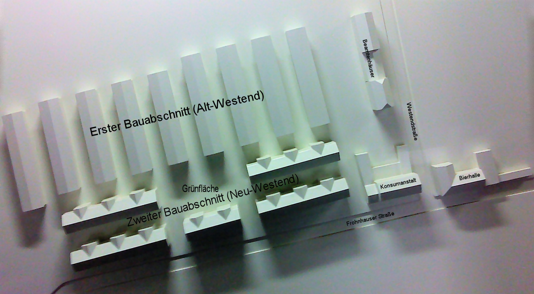 Schema der Arbeiterkolonie Westend in Essen